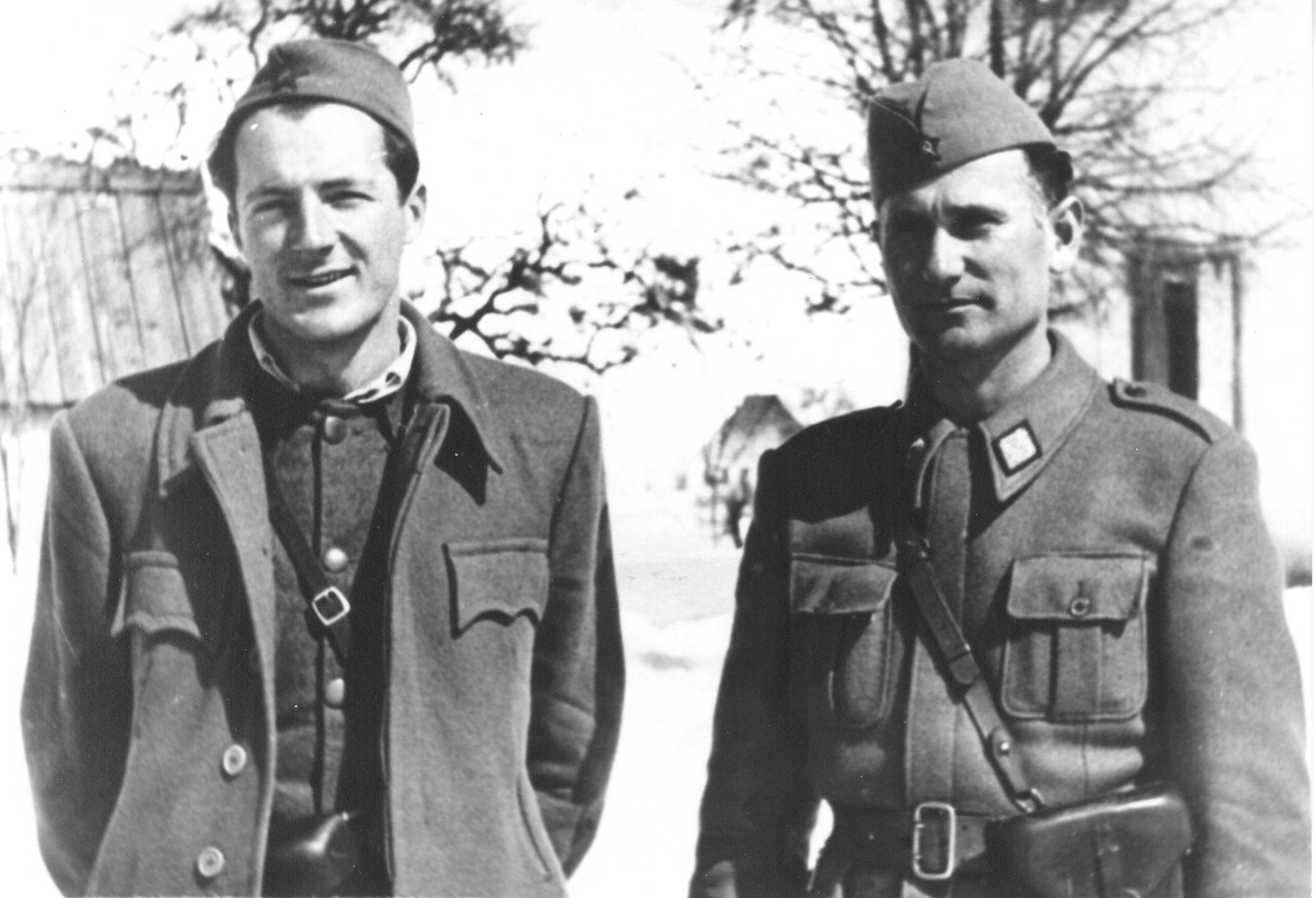 Srpski (latinica): Jovo Kapičić - politički komesar 4. proleterske brigade i Radovan Vukanović - komandant brigade, u Crnoj , Gori, 1944.